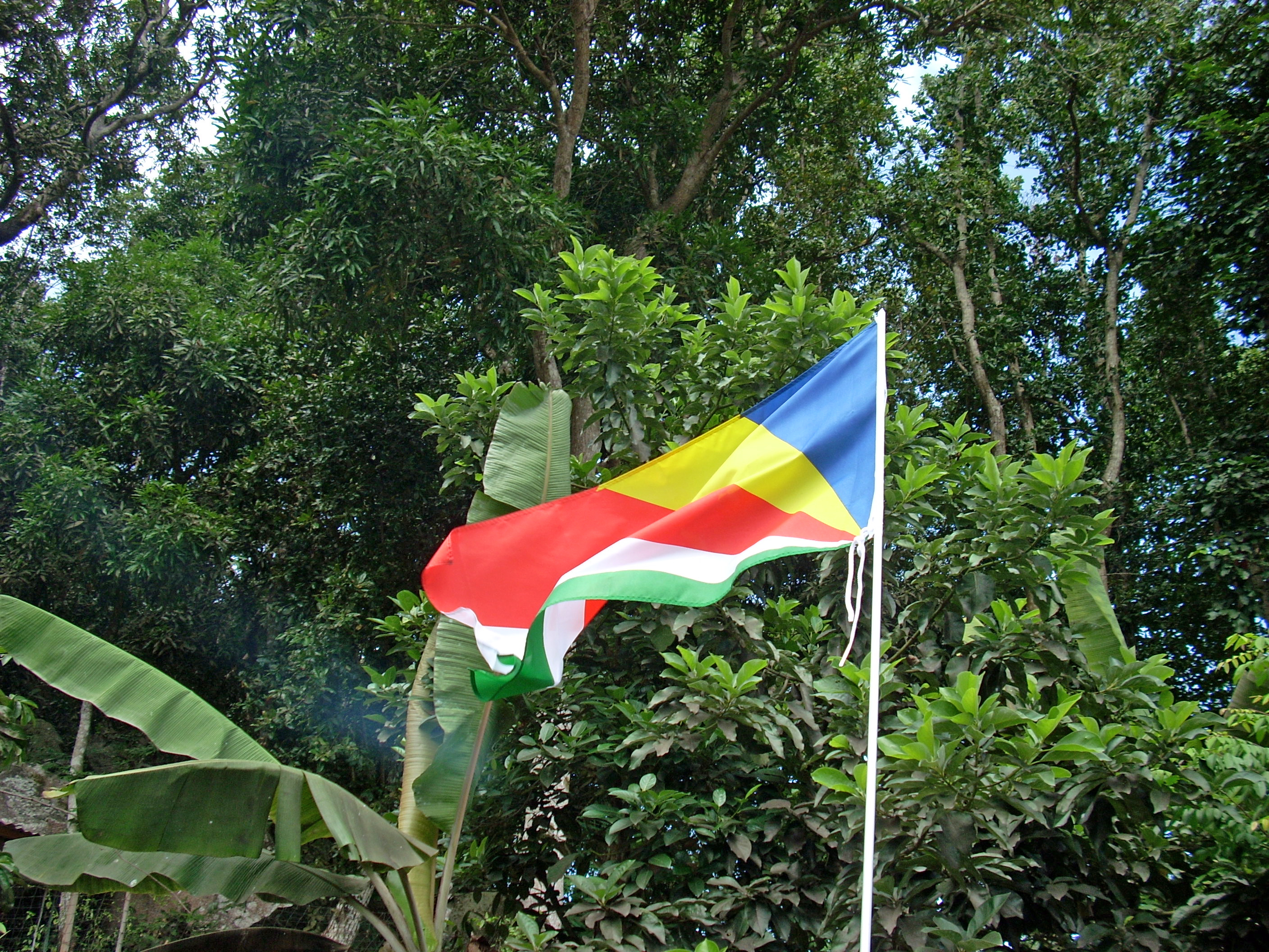 Piantata con orgoglio da Cliff